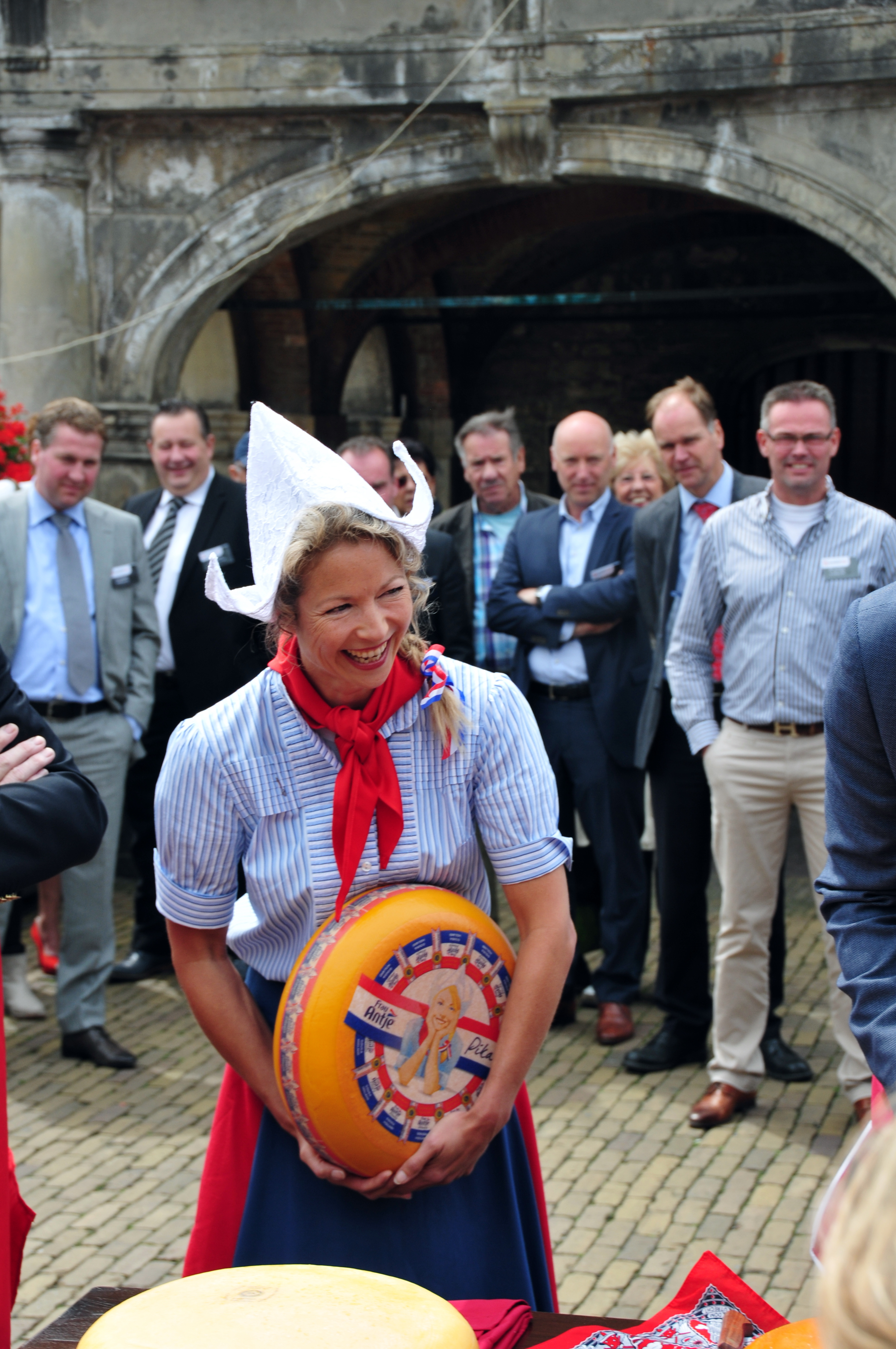 Gouda, Niederlande, Stadtzentrum